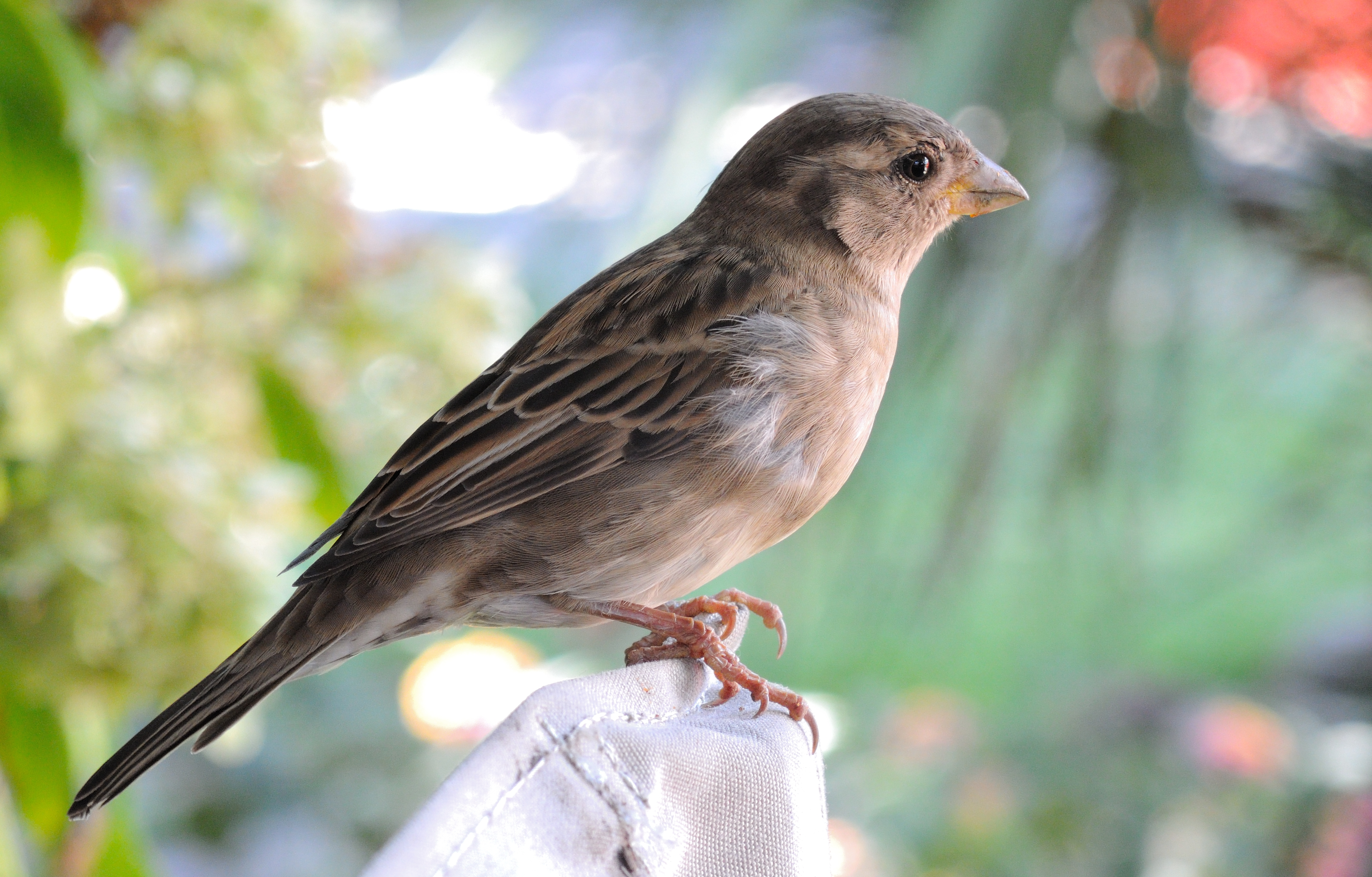 Gorrión común tomado en la rambla de Montevideo, Uruguay.